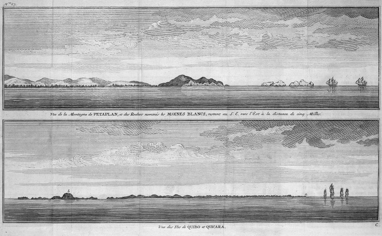 [Illustrations de Voyage autour du monde] Auteur : George Anson Éditeur : Henri-Albert Gosse et Compagnie (Genève) 1750